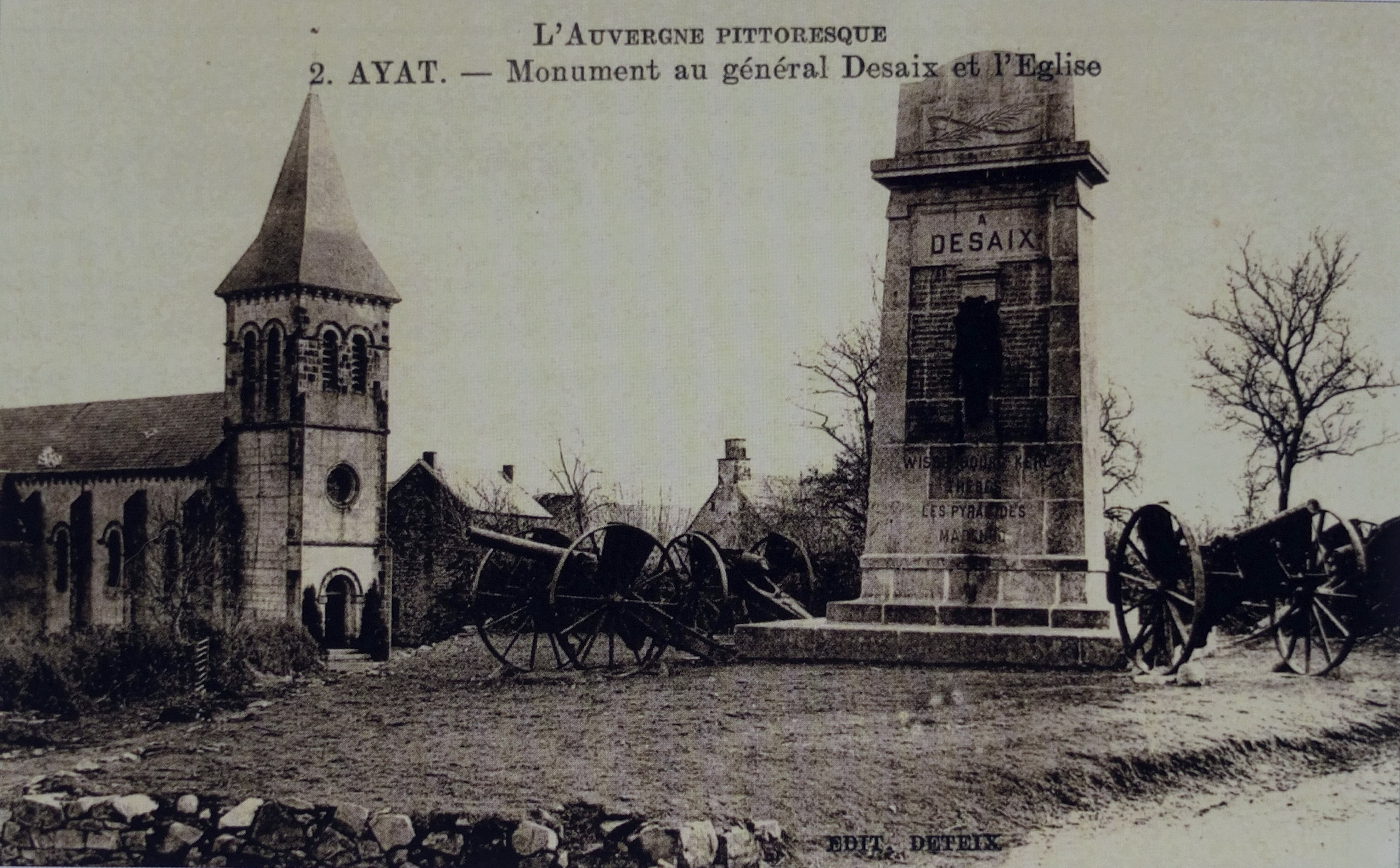 Ayat, monument au général Desaix, inauguré en 1890. Carte postale vers 1910, éditions Deteix.